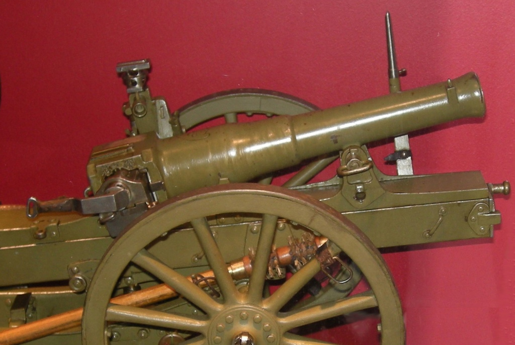 7,5 Gebirgskanone 08 Rohr